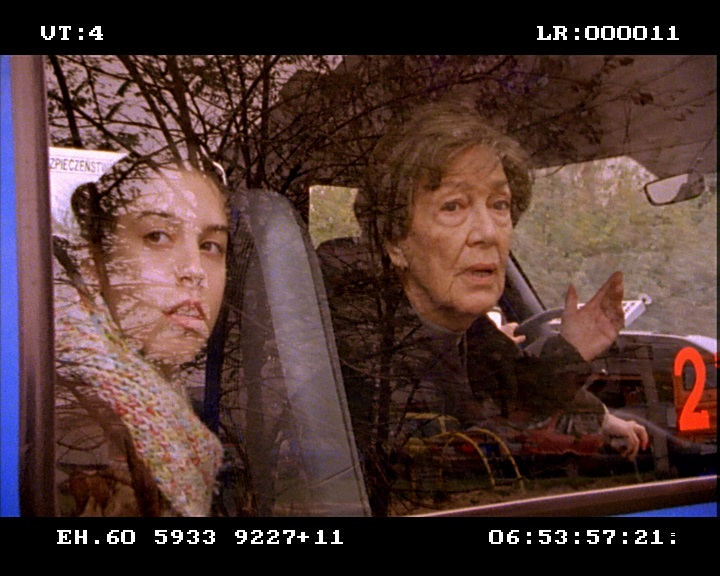 גאיה טראוב ובתיה לנצט בסרטו של חורחה גורביץ' השרשרת של פסיה